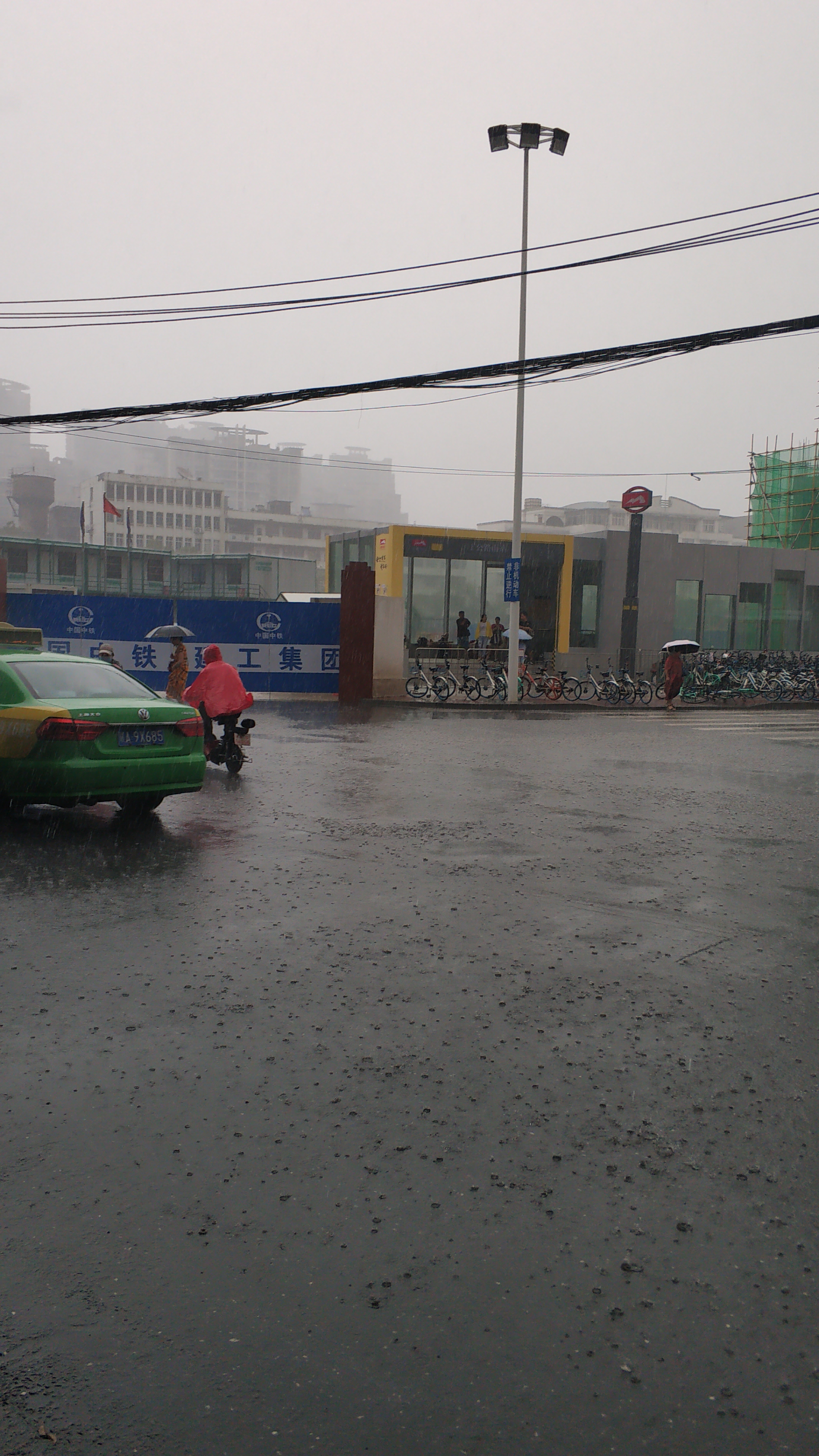 2019年8月15日下雨时的丁公路南站